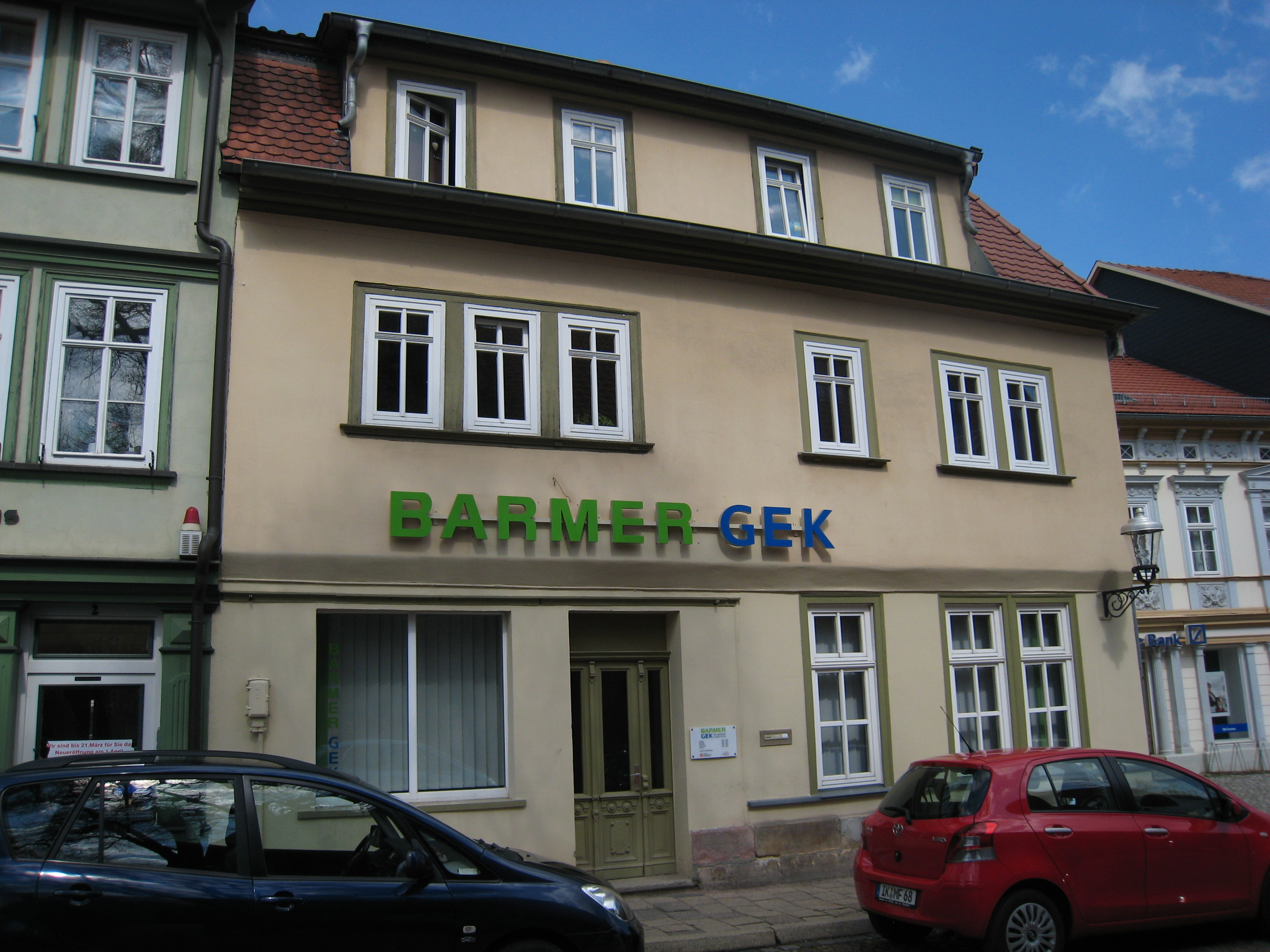 Haus An der Neuen Kirche 4 in Arnstadt, ehemaliger Keul-Brauhof